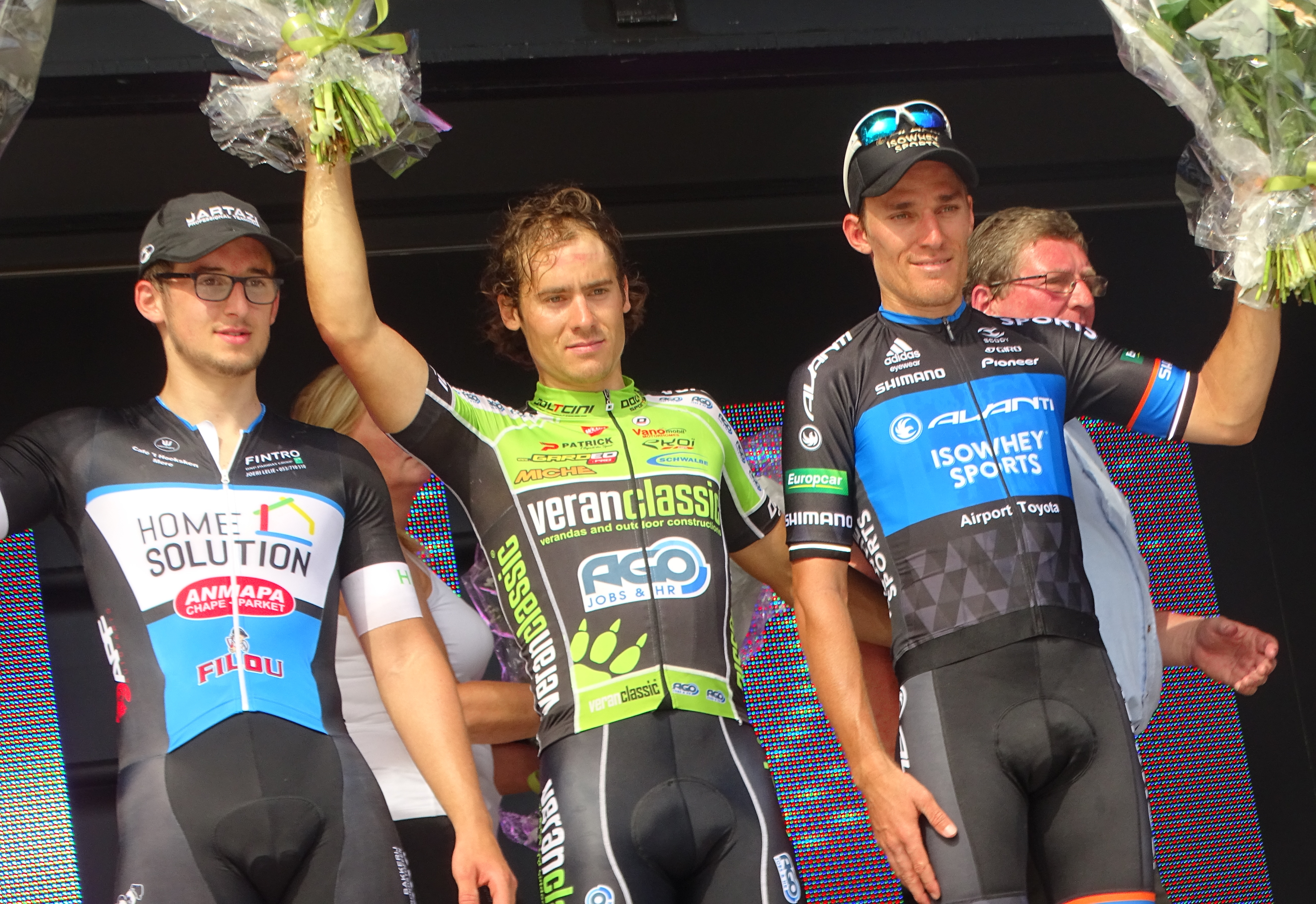 Reportage réalisé le samedi 9 juillet à l'occasion du départ et de l'arrivée du Grand Prix de la ville de Saint-Nicolas 2016 à Saint-Nicolas, Belgique.